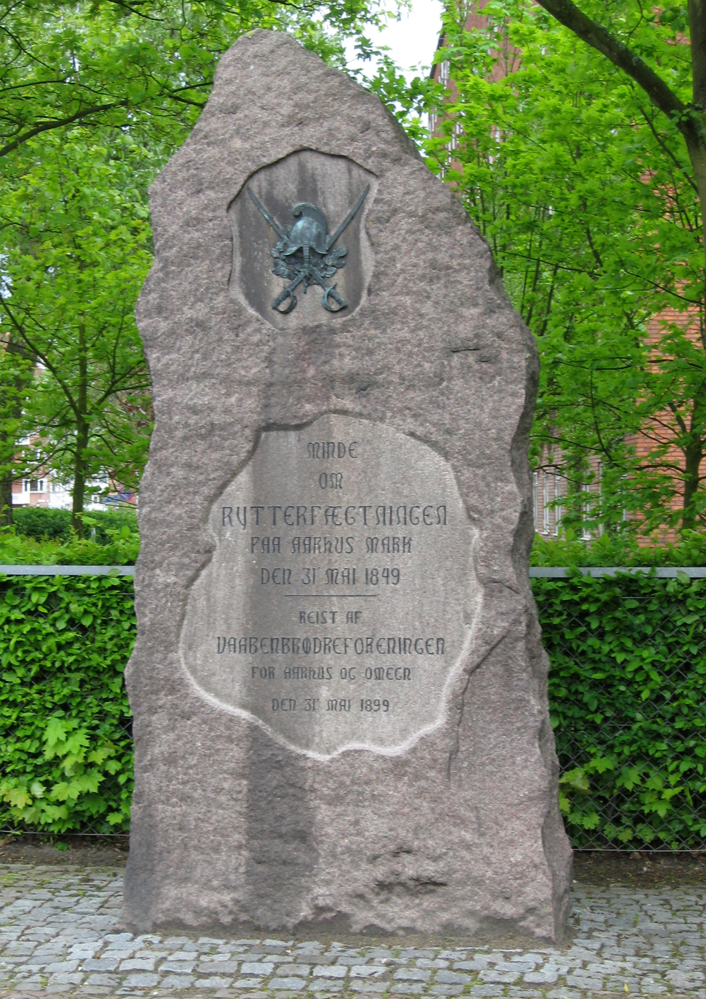 Memorial for Rytterfægtningen ved Århus, a minor battle during the 1848-51 war. Placed at the corner of Trøjborgvej and Nørrebrogade in Århus, Denmark.